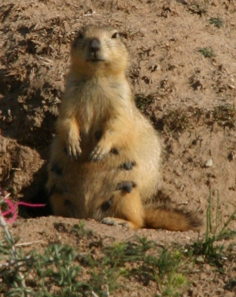 Spermophilus fulvus; Photo prise à Nourata (Ouzbékistan)